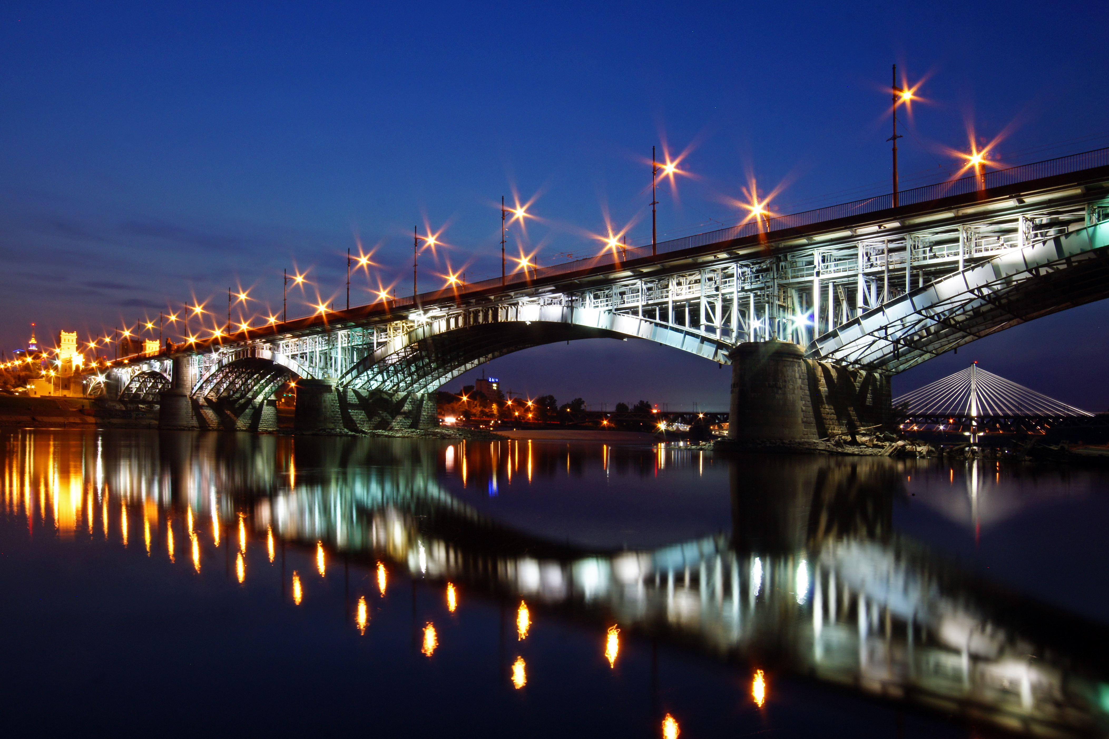 Most i wiadukt im. Poniatowskiego, 1905-13, 2 poł. XX.